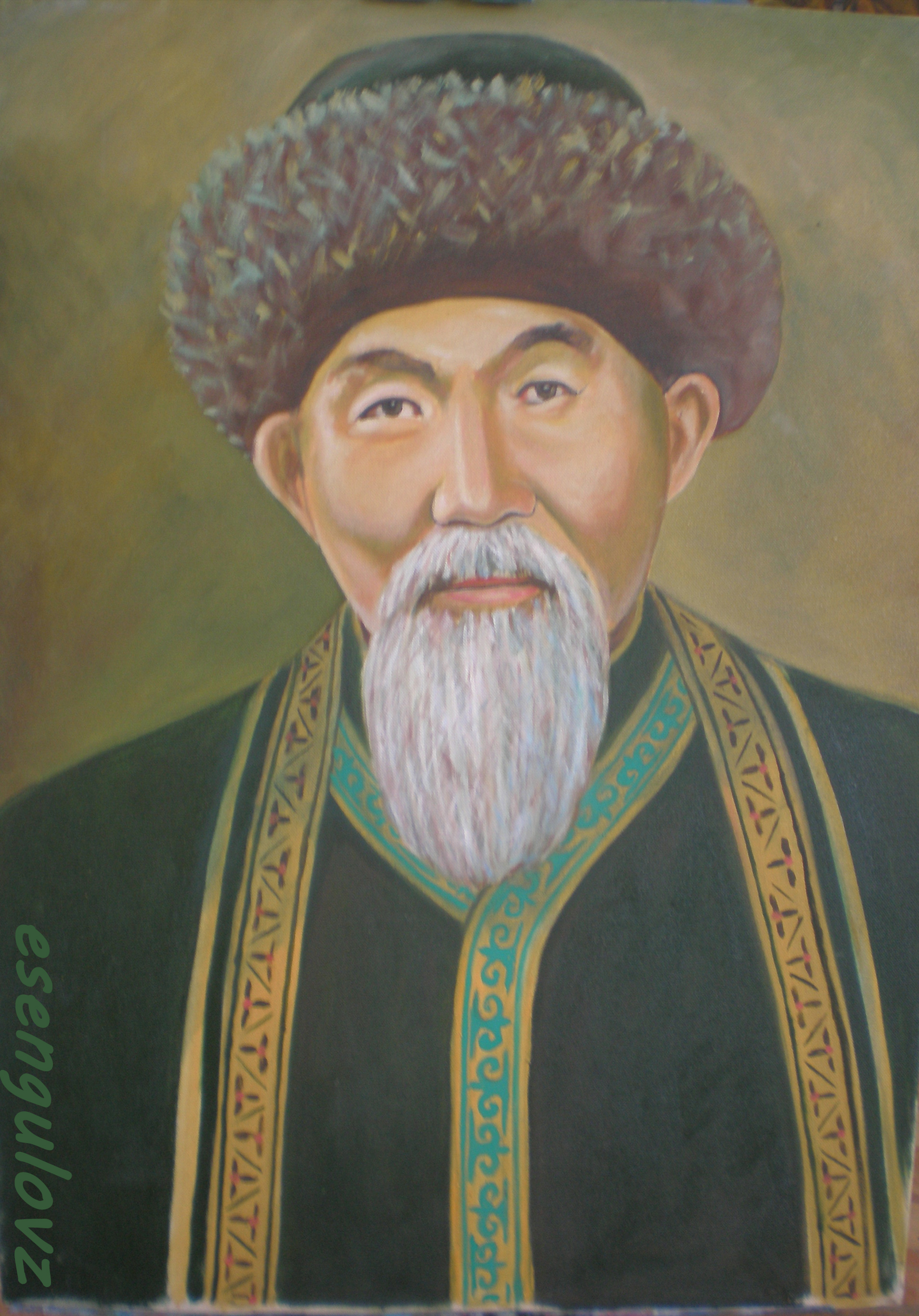 Картина Нурпеиса Байганина